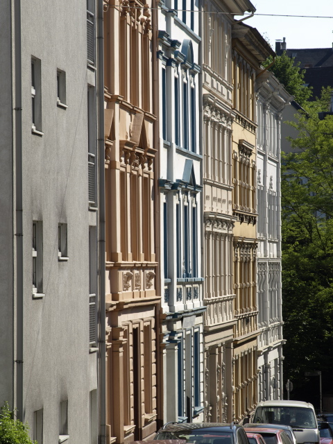 Gründerzeitfassaden in der Elsasser Straße in Wuppertal, Wohnquartier Ostersbaum